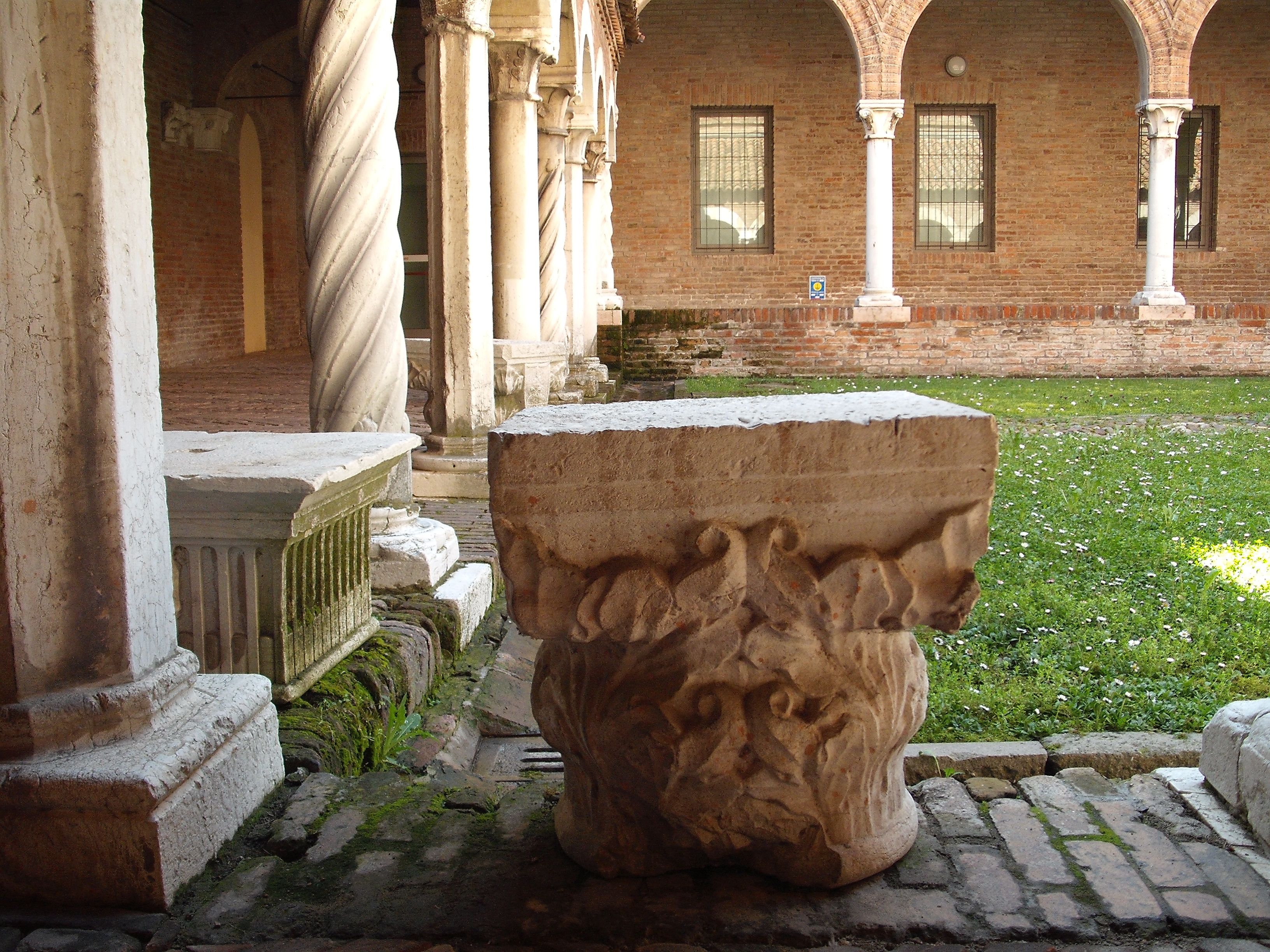 Museo della Cattedrale This is a photo of a monument which is part of cultural heritage of Italy.